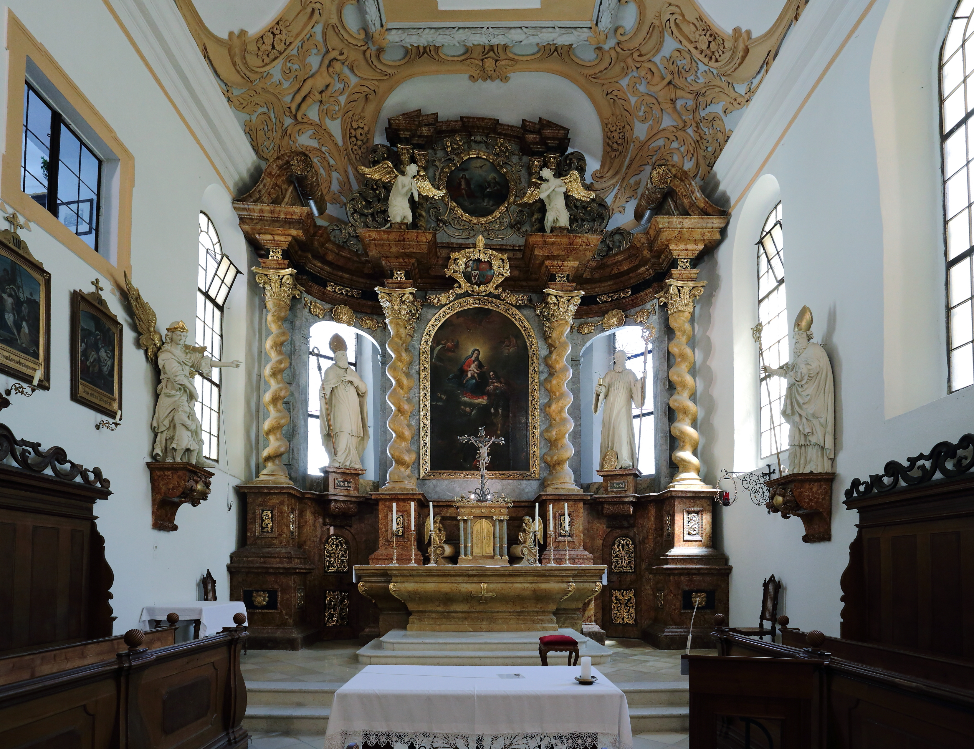 Hochaltar der ehemaligen Pfarrkirche Maria Schnee der niederösterreichischen Stadt Gloggnitz. Der barocke Hochaltar wurde 1701 gefertigt. Das Altarbild stellt Maria mit dem hl. Oswald dar und die überlebensgroßen Statuen die hll. Gotthard und Benedikt.